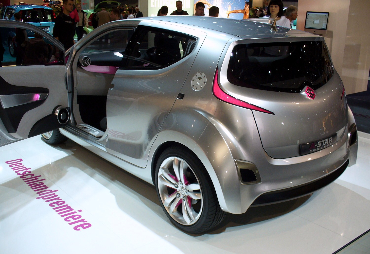 Suzuki A-Star Concept